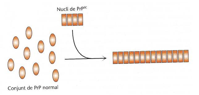 Nucli polimeritzat de PrPsc indueix el seu propi creixement